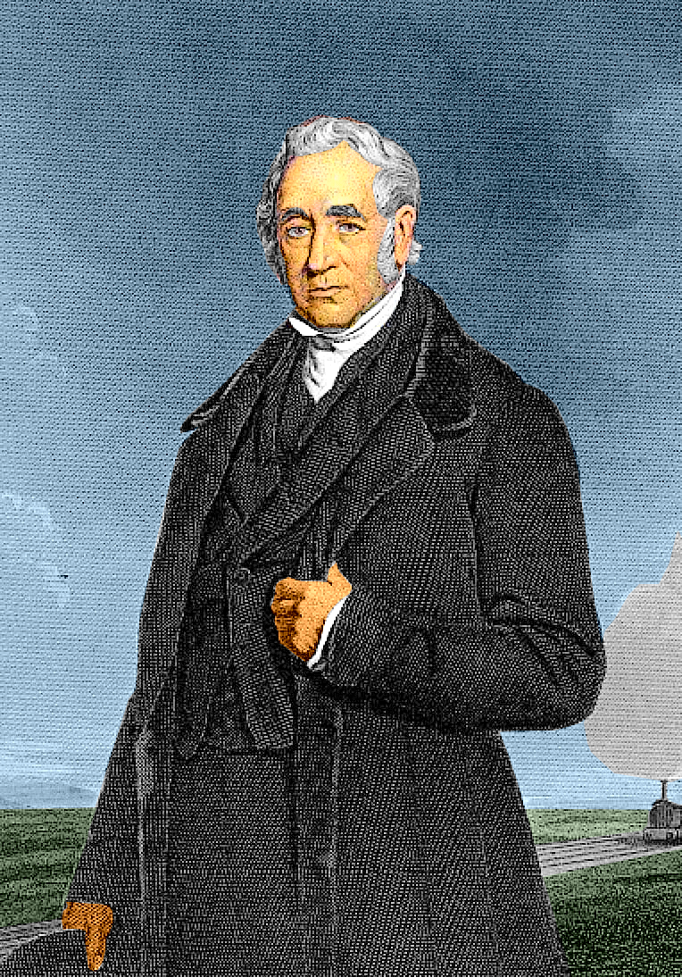 George Stephenson PD tekening van UT Library, ingekleurd naar bestaand schilderij